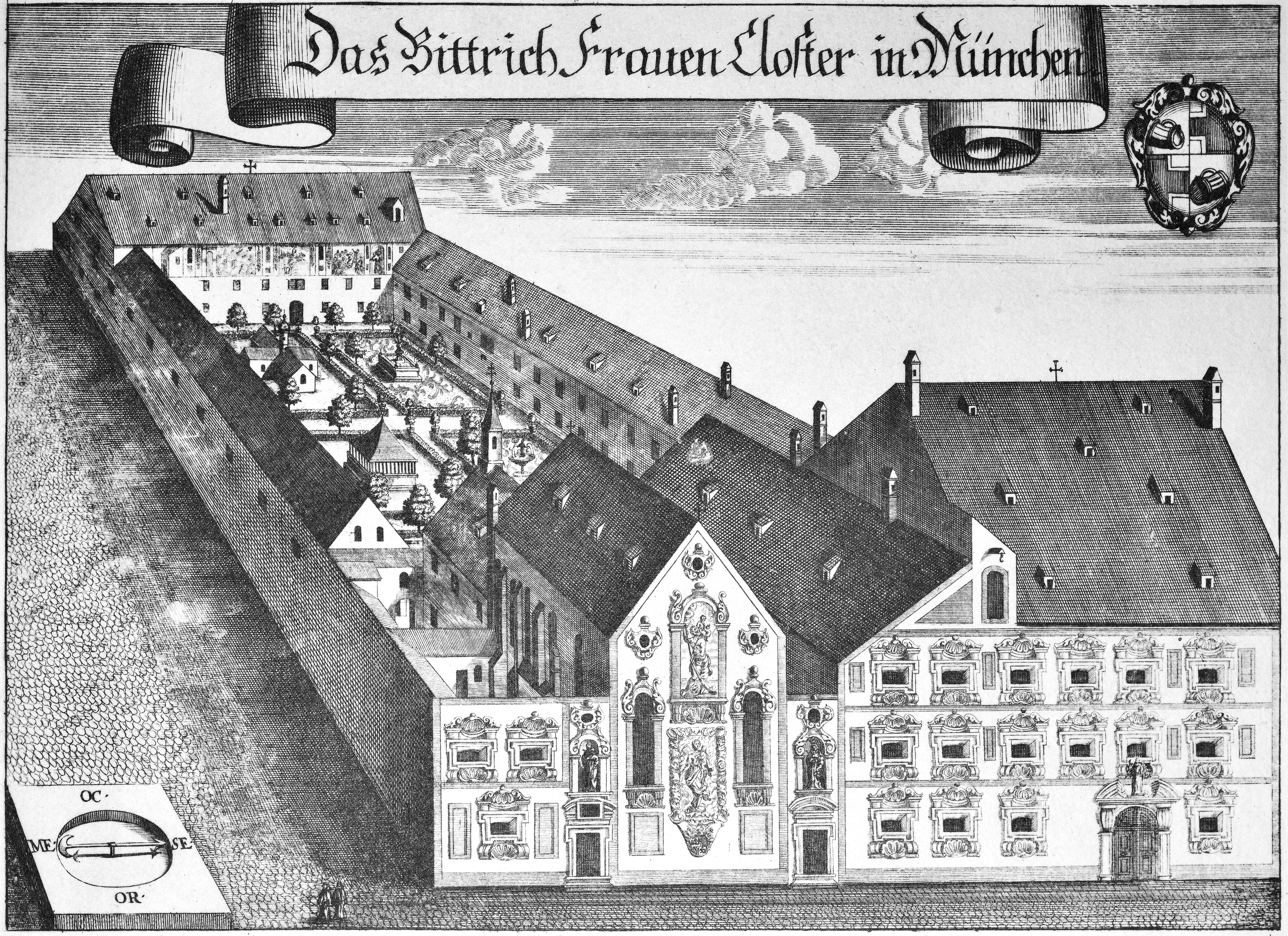 München. Das Bittrichkloster, oder Pütrichkloster genannte Frauenklosteranlage im Zustand der Zeit um 1700 nach einem Kupferstich von Michael Wening erschienen in Beschreibung Deß Churfürsten- und Herzogthums Ober- und Nideren Bayern im Jahr 1701. Das Pütrichkloster wurde im Jahr 1802-1803 aufgelöst und die letzten Gebäudeteile bereits bis zum Jahr 1806 abgetragen. Es zeigt die Situation gegenüber dem Max-Joseph-Platz, entlang der Residenzstraße, Ecke Perusastraße. Etwa die heutige Bebauung der Anwesen Residenzstraße 11 und 12, teile der Perusastraße selbst und die Rückseite entlang der Theatinerstraße.